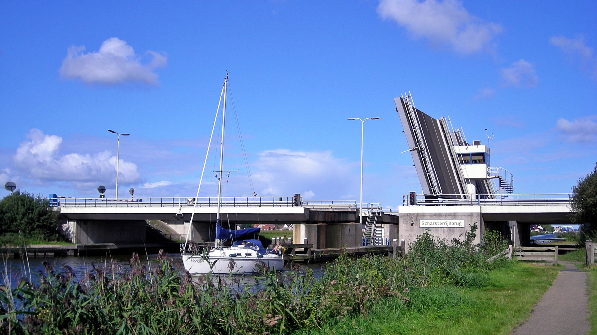 Scharsterrijnbrug (bridge) over de Skarster Rien in rijksweg A6